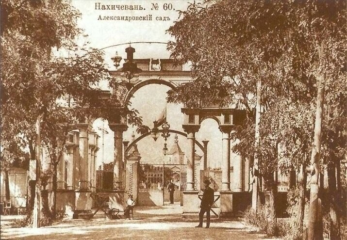 Ростов-на-Дону до Октябрьской революции. Главный вход в Александровский сад (ныне парк Вити Черевичкина).